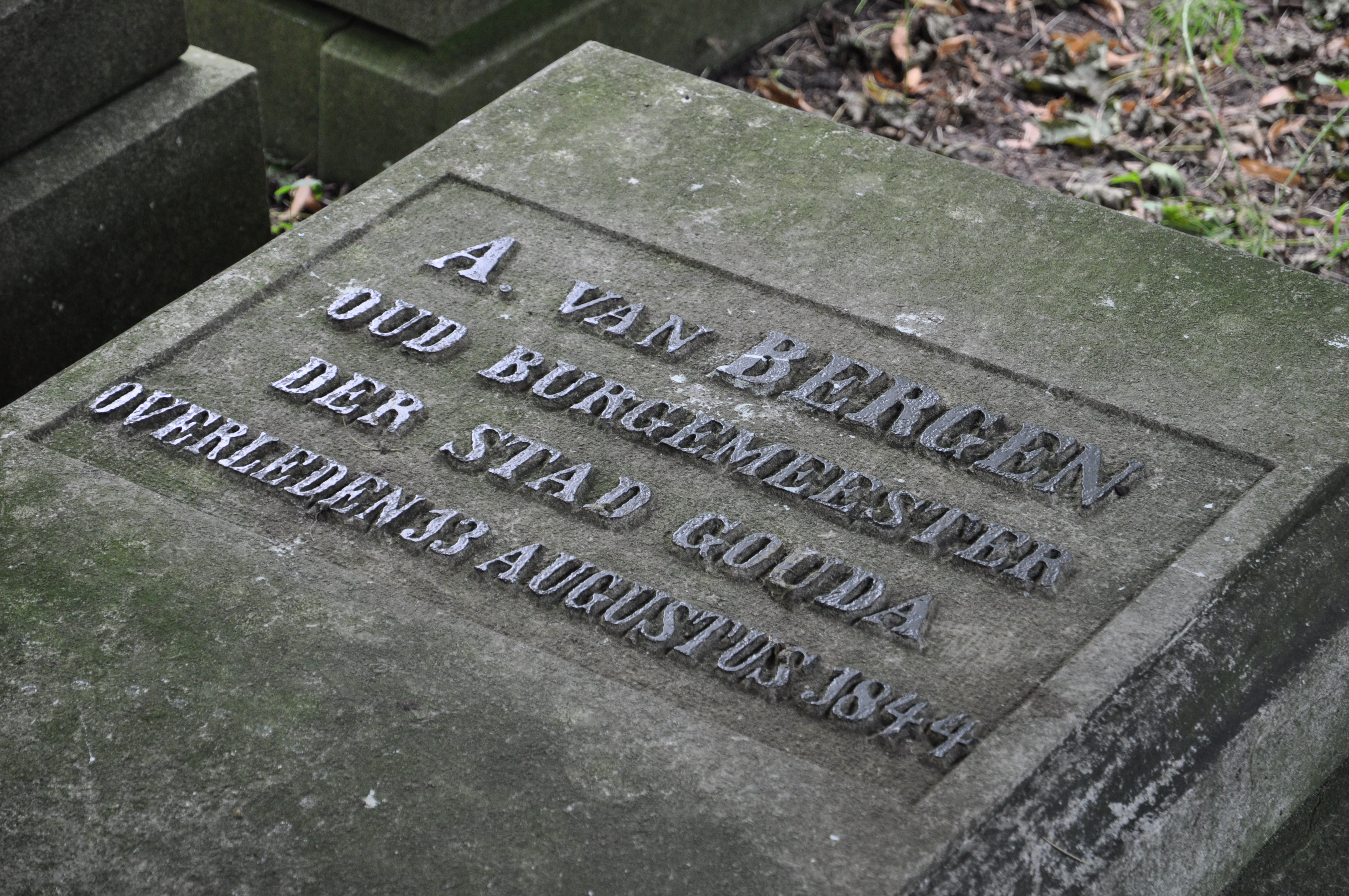 Oude Begraafplaats Gouda. Tekst: A. van Bergen, oud Burgemeester der stad Gouda, Overleden 13 augustus 1844